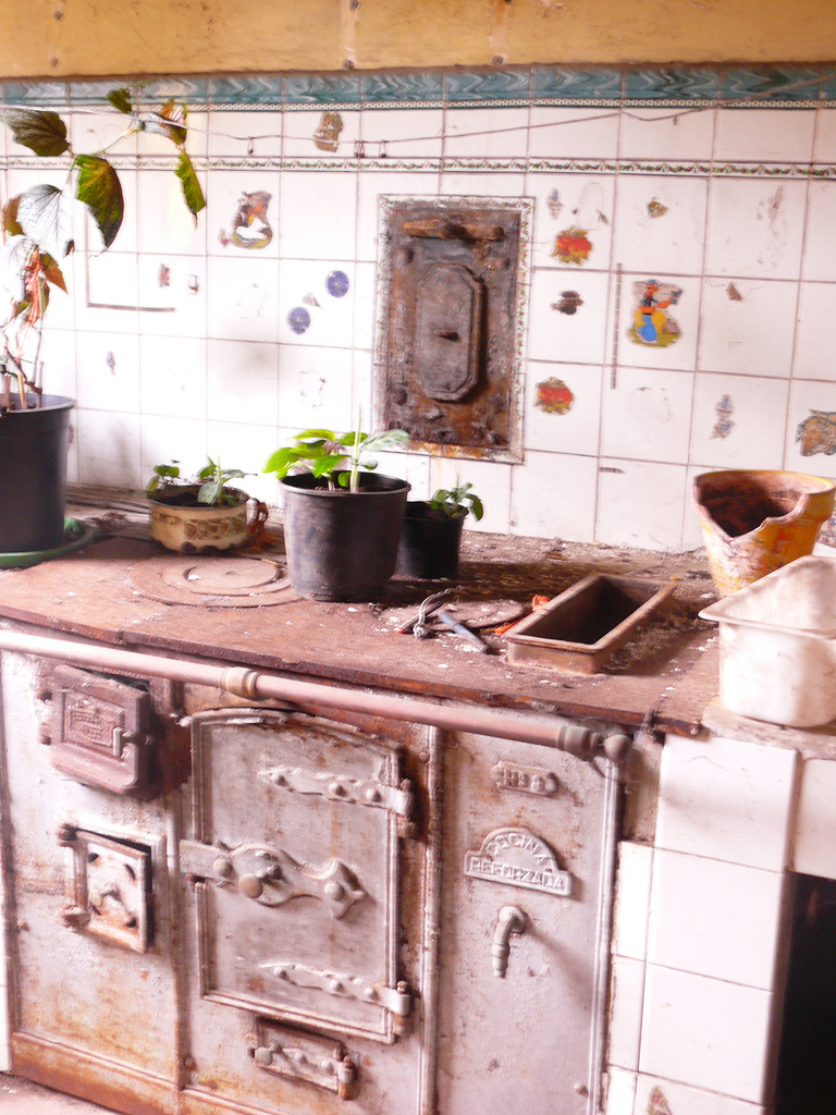 Cociña de ferro, A Estrada, Galiza